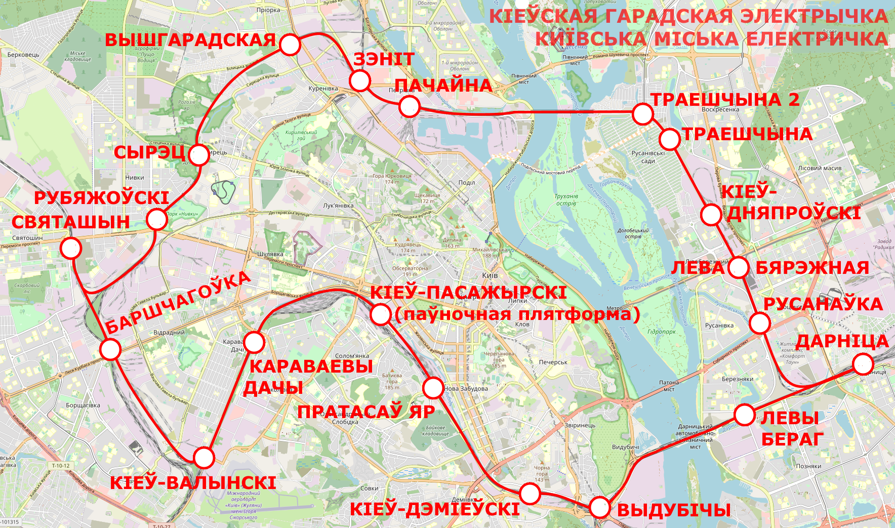 Беларуская (тарашкевіца): Схема Кіеўскай мескай электрычкі. Напісы па-беларуску.